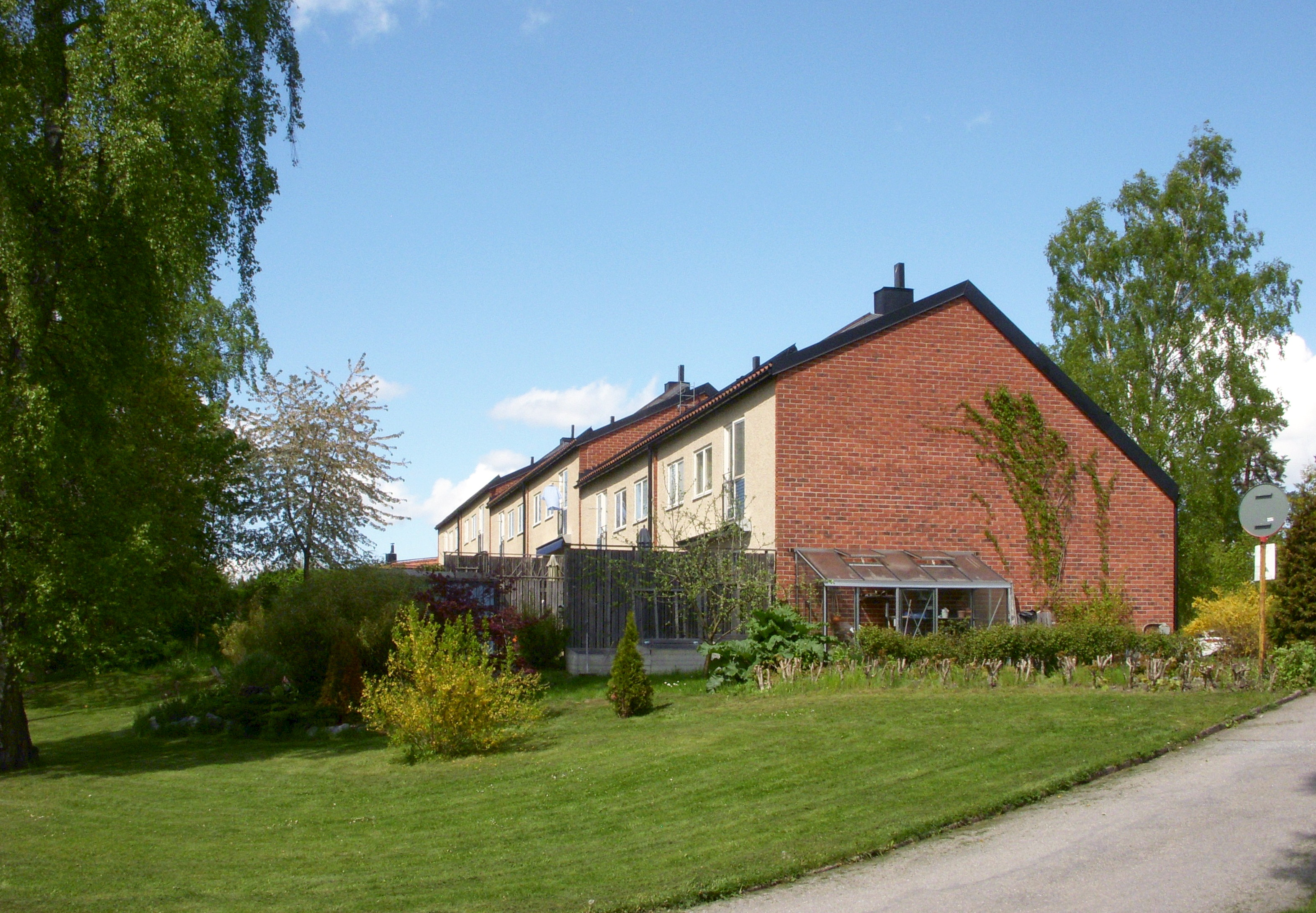 Radhusområde Fresia 4, Måbärsstigen, Hässelby Strand, arkitekt Anders William-Olsson, klart 1957